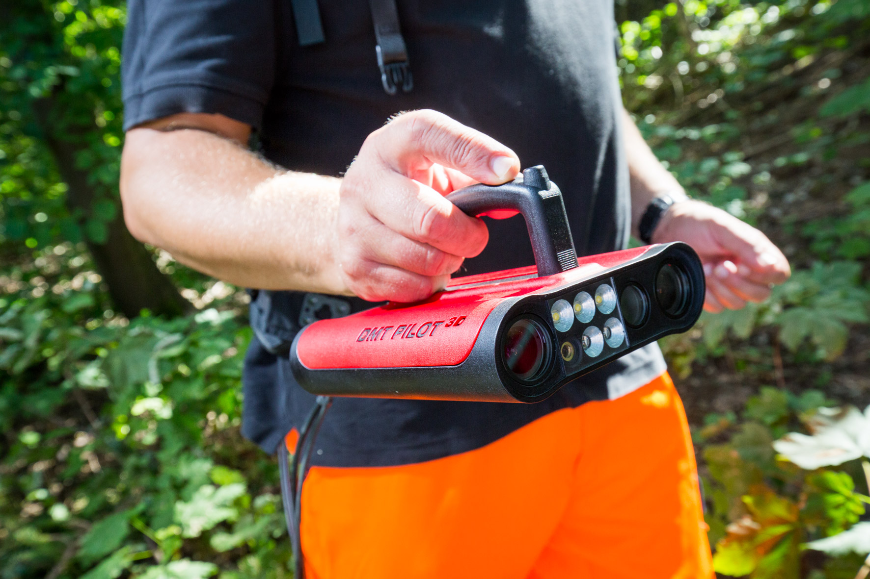 Einsatz des DMT Pilot 3D im Wald